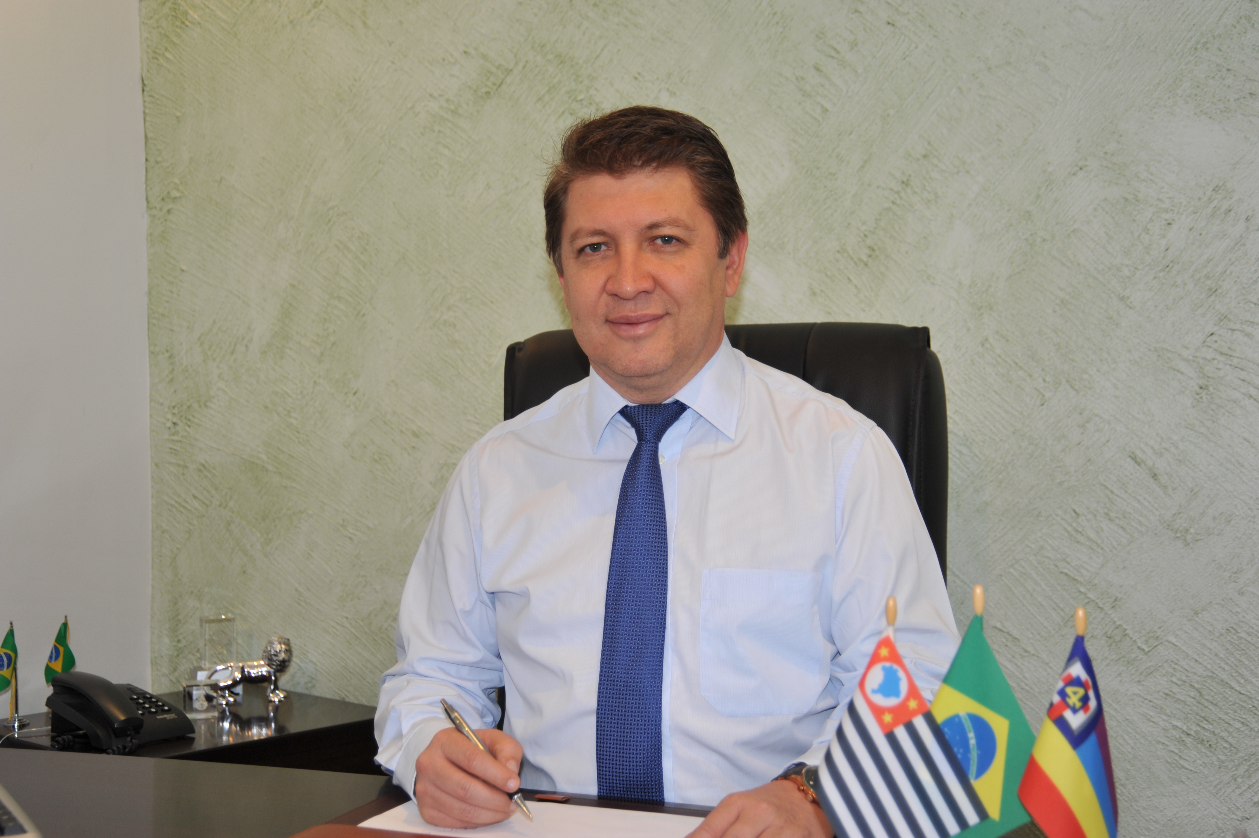 Deputado Federal e Pr. Quadrangular